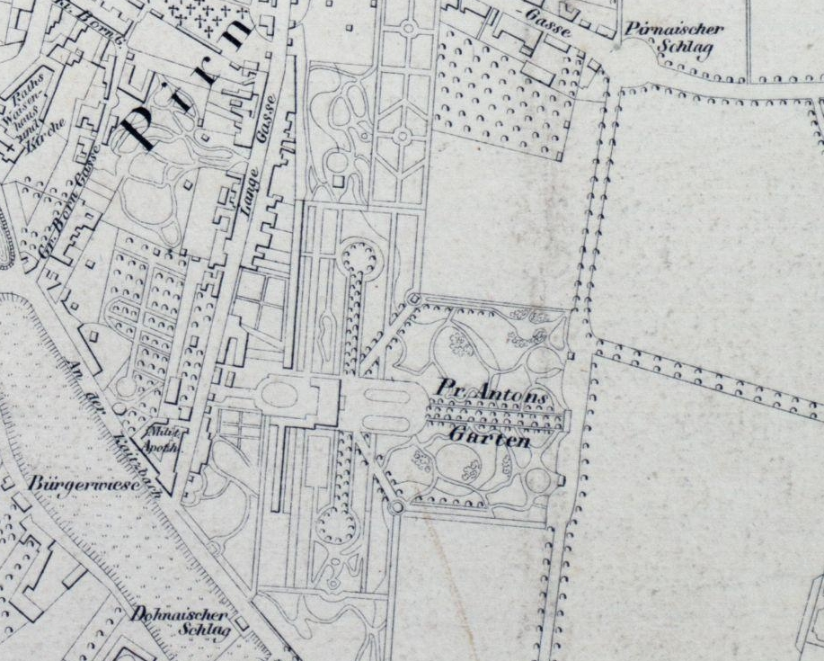 Lage von Prinz Antons Garten im Stadtplan von Heinrich Lesch, 1828